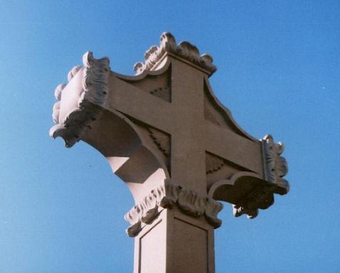 Sokolniki Wielkie, krzyż z fundacji z 1846 roku. Województwo Wielkopolskie, Powiat Szamotulski.